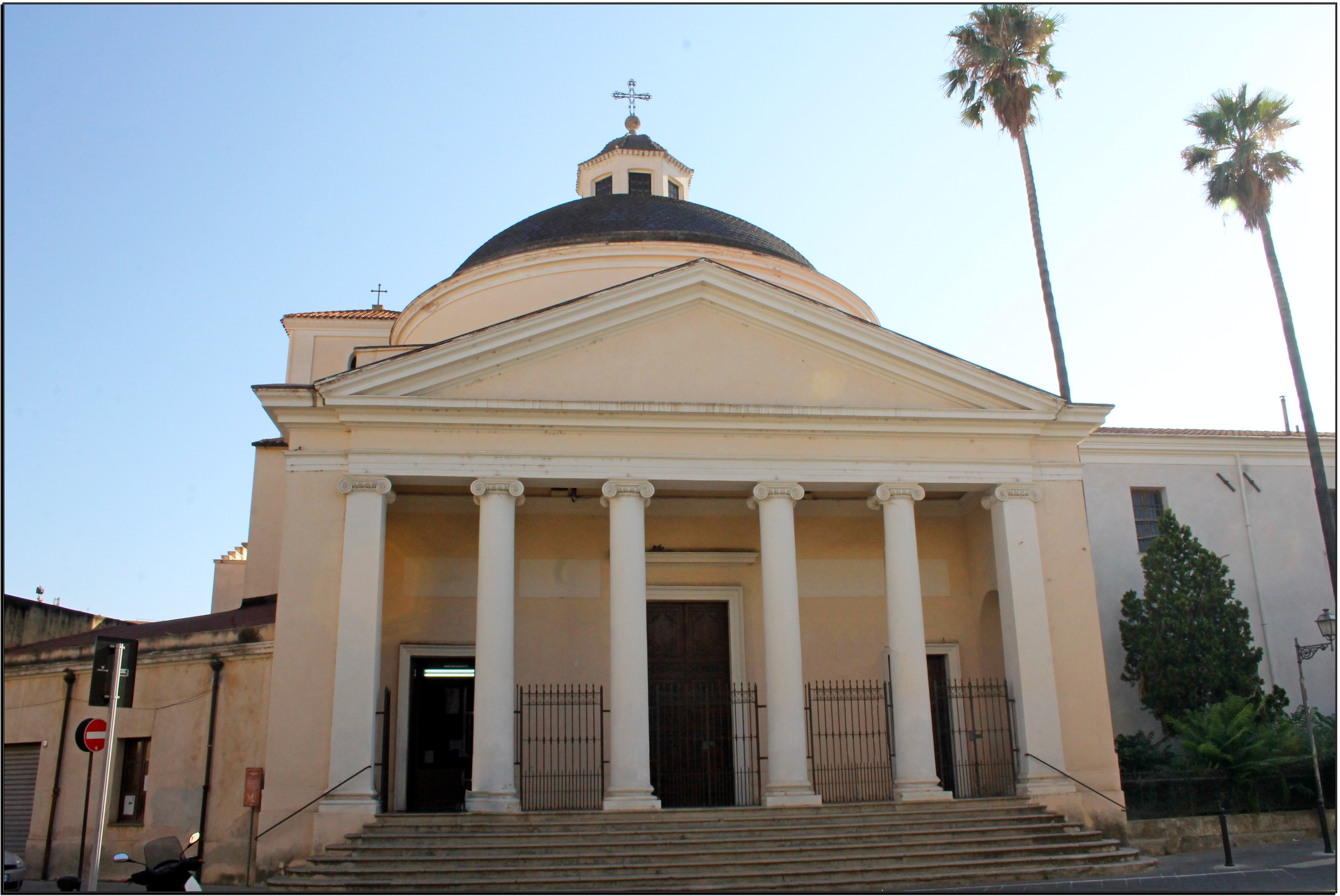 Chiesa di San Francesco Oristano